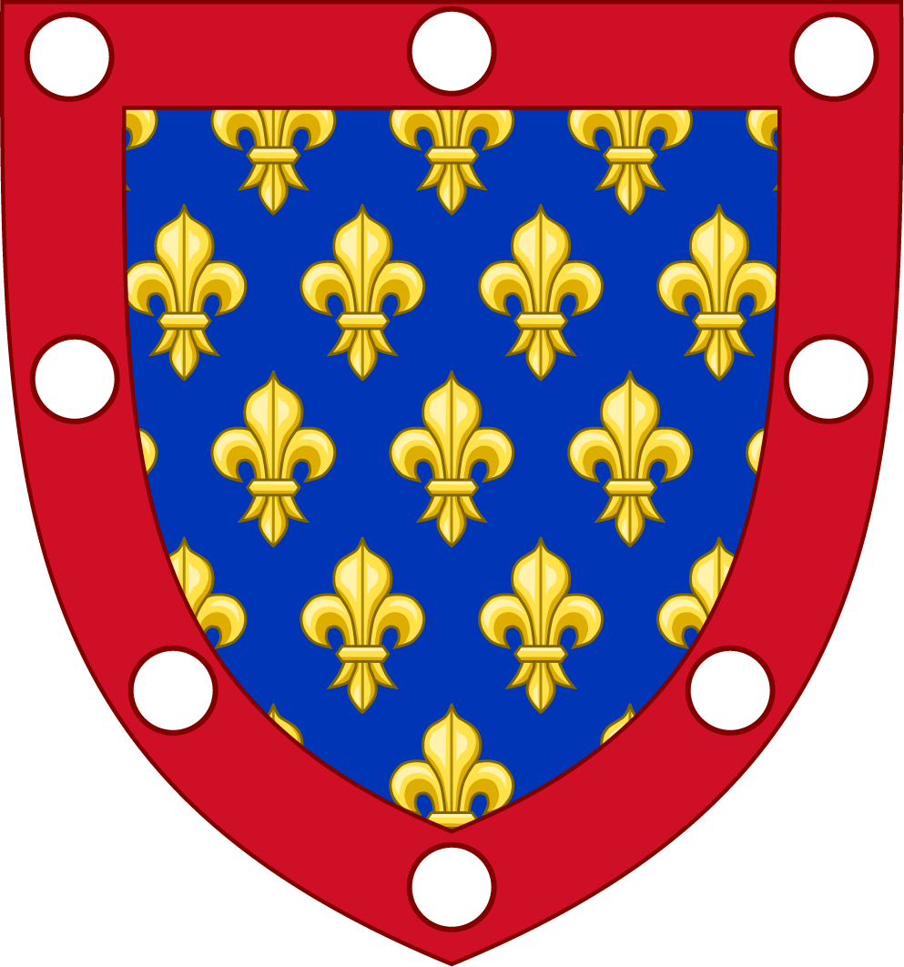 Blason de Pierre Ier d'Alençon.